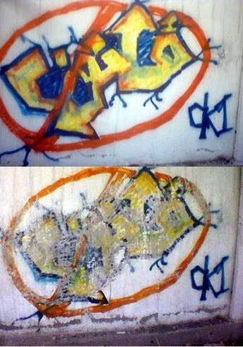 Wallpainting by by Keyvan Shovir (Ck1) entitled "Law is Banned", Between Apadana and Ekbatan access road, before and after removal by the municipality. گرافیتی جنجالی در حاشیه خالی میان شهرک آپادانا و اکباتان، اثر کیوان شویر در حاشیه‌ی بزگراه شیخ‌فضل‌الله نوری (بزرگراه‌ تهران کرج قبل و بعد از پاک شدن توسط شهرداری).